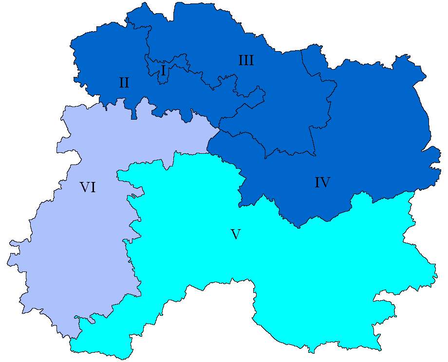 Députés de la Marne en 1993